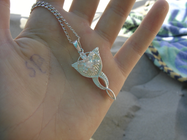 Foto zelf gemaakt